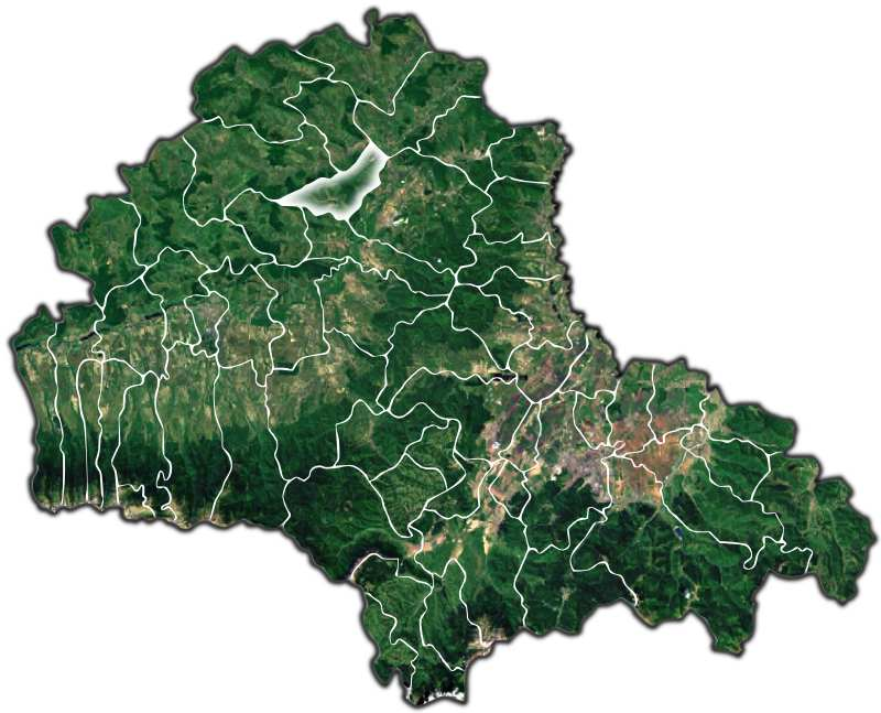 Ungra jud Brasov